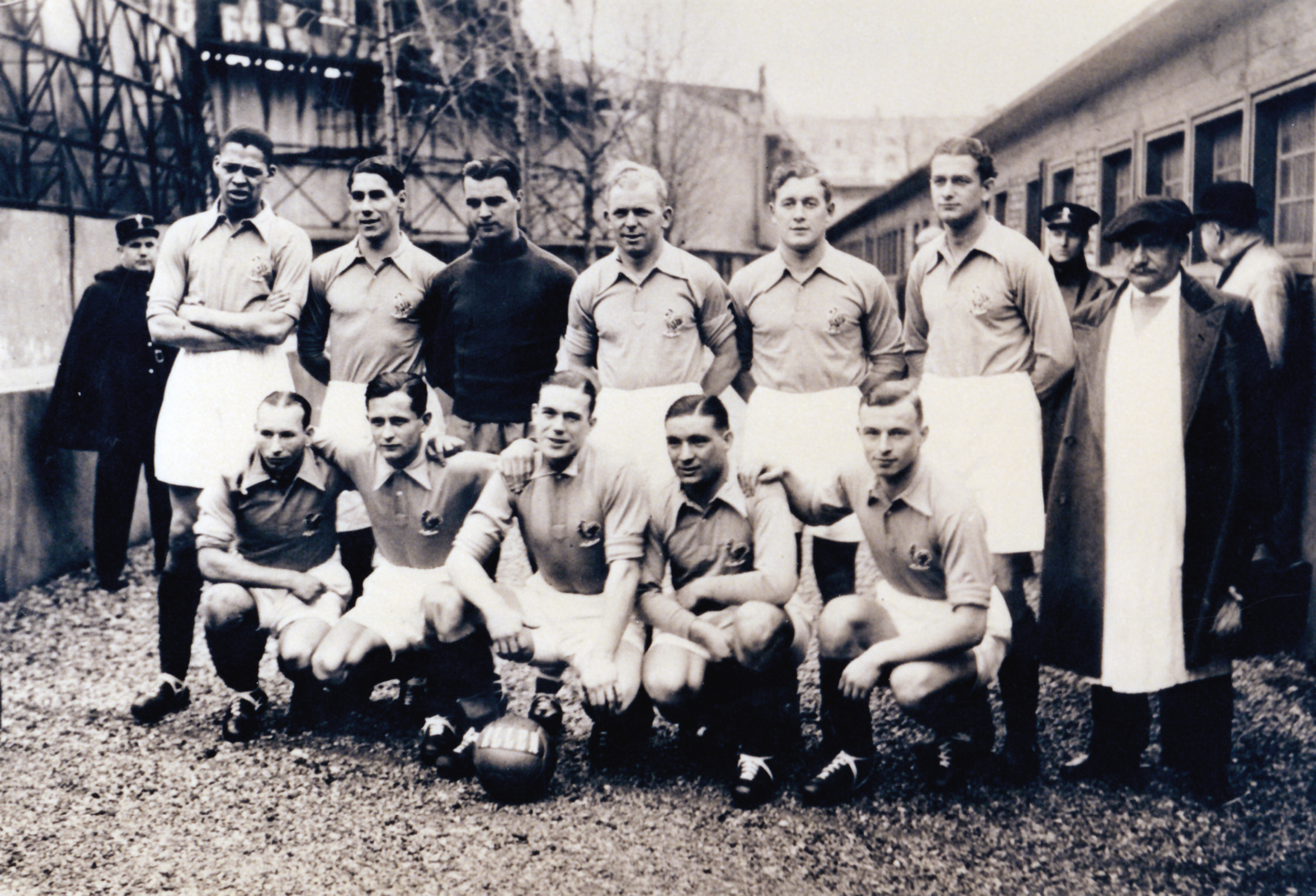 France - Autriche, 24 janvier 1937, Paris. Au premier rang, de gauche à droite : Edmond Novicki, Roger Rio, Jean Nicolas, Georges Janin, Bernard Antoinette. Au second rang, de gauche à droite : Raoul Diagne, Maurice Dupuis, René Llense (gardien de but), Matthieu André, Michel Payen, Louis Gabrillargues, le masseur Panosetti.